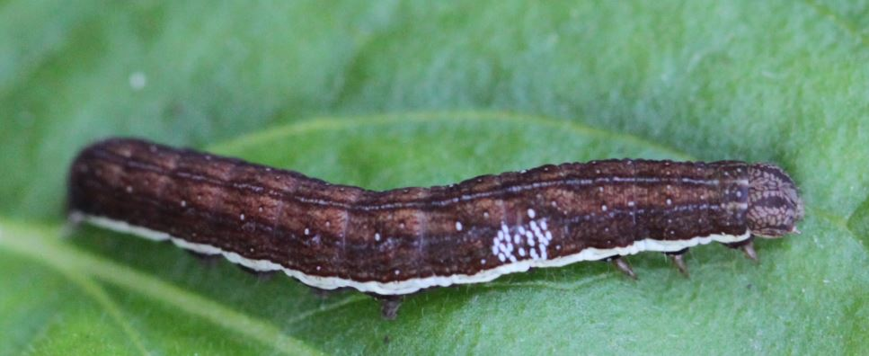 Raupe von Actinotia polyodon (parasitiert von Erzwespen), am 28.8.2017 in der Schwetzinger Hardt